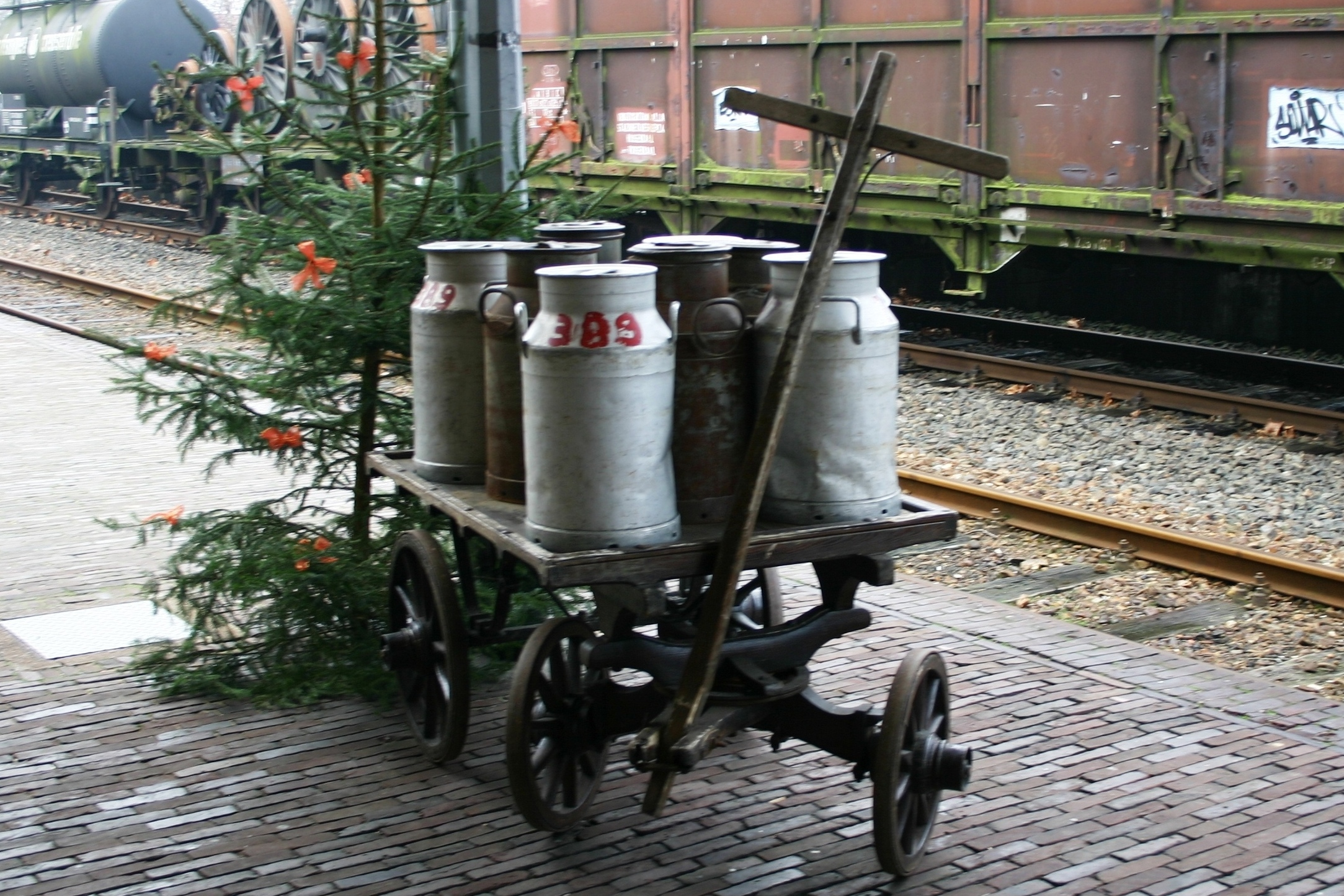 Mëllechkanen um Weenchen op der Gare zu Simpelveld. Kategorie:Landwirtschaft